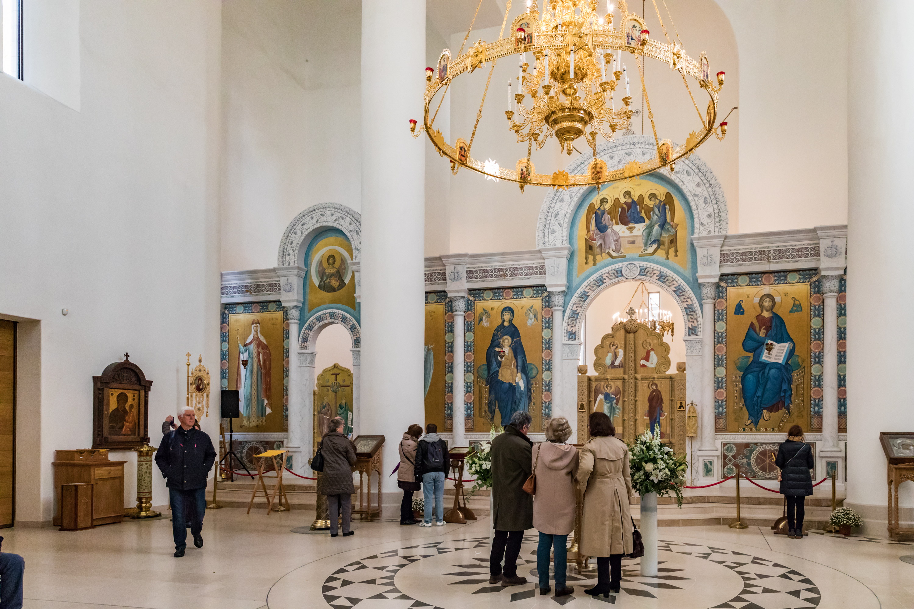 Paris, Russian Orthodox cathedral and Cultural Center in Paris, Quai Branly. Opening 2016 Cвято-Tроицкий Kафедральный Cобор корсунской епархии Pусской Православной Церкви (Mосковский Патриархат)